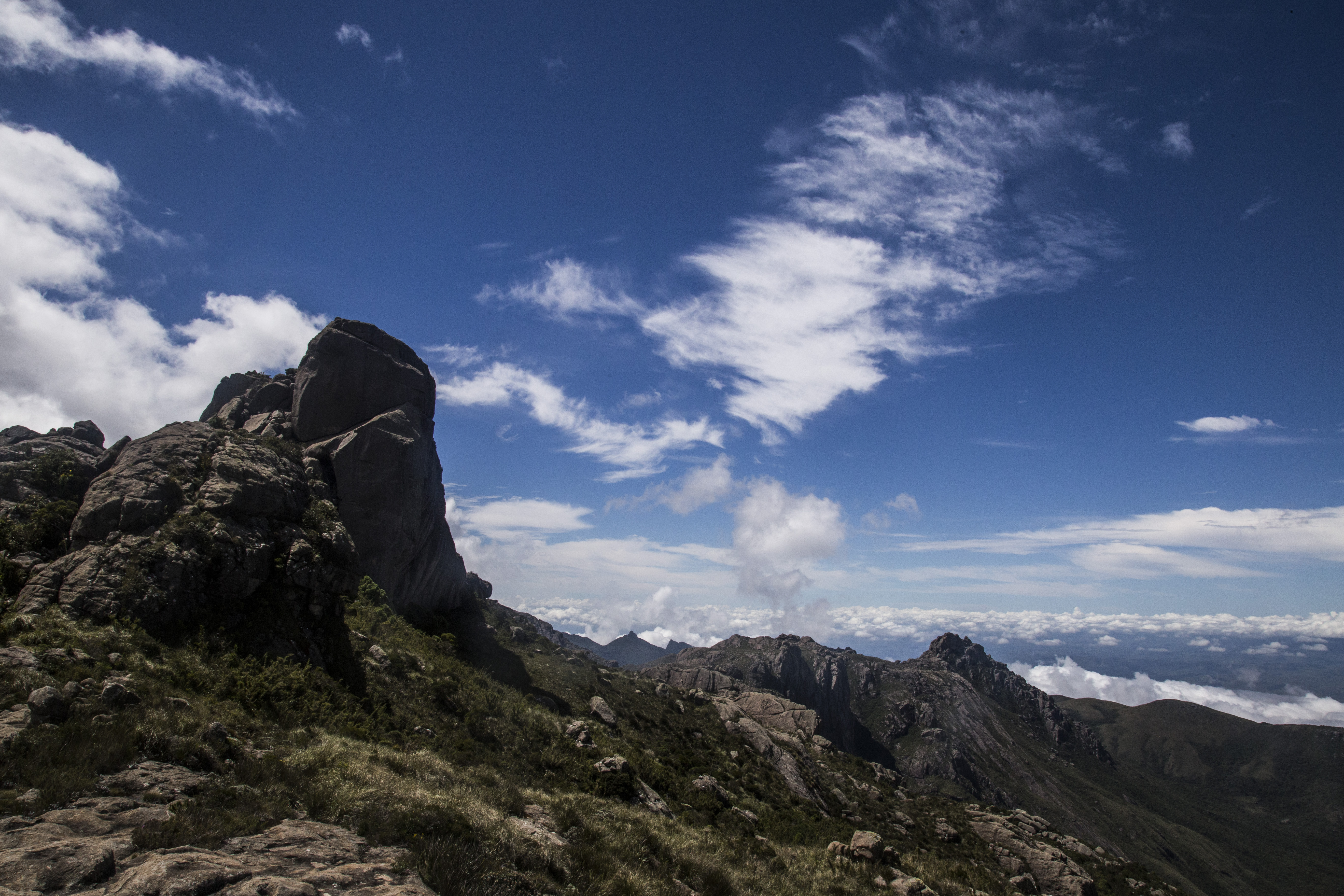 Trilha do morro do Couto, onde é possível avistar quase toda a extensão do parque